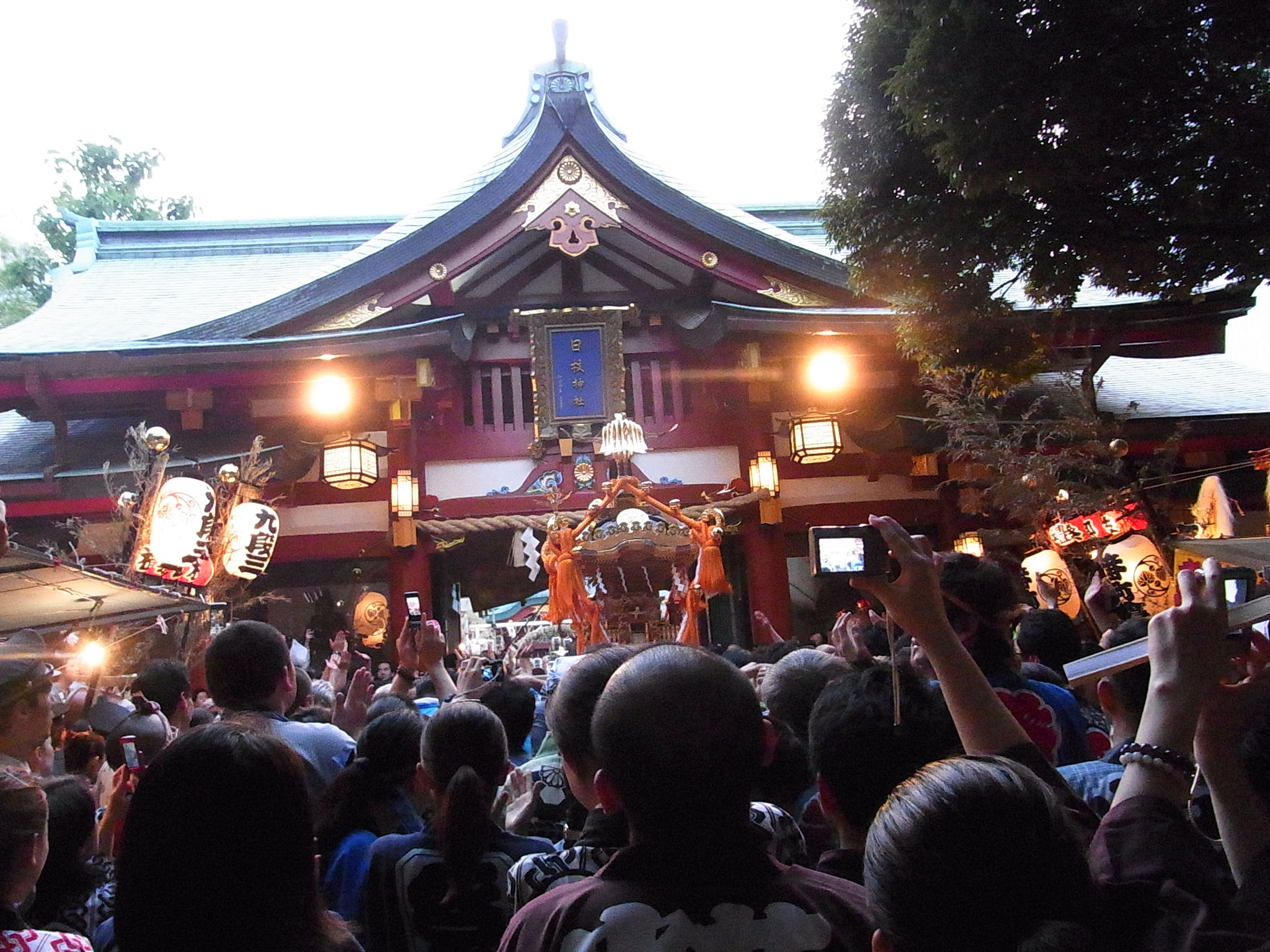 日枝神社 山王祭